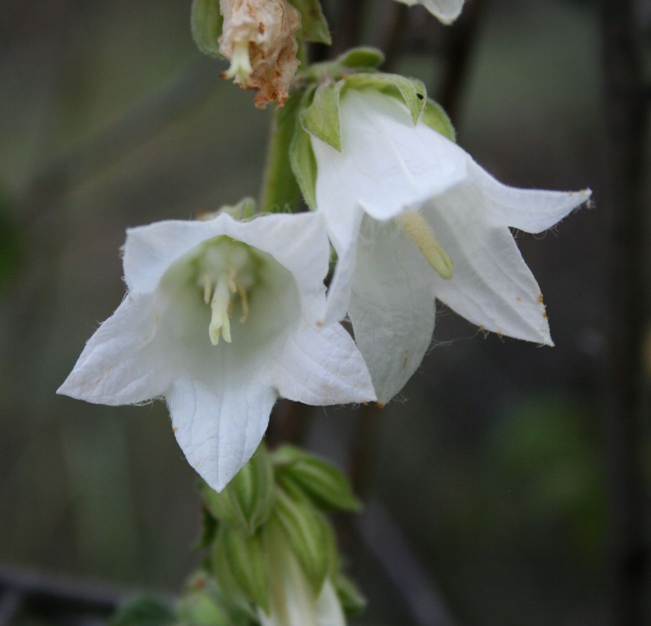 Campanula alliariifolia subsp. alliariifolia, Glockenblumengewächse (Campanulaceae) – Georgien/საქართველო: Tbilissi/თბილისი, SW Botanischer Garten, ca. 610 m s.m.